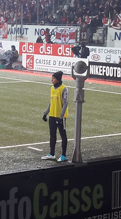 Mbappé vs ASNL (6 may 2017).